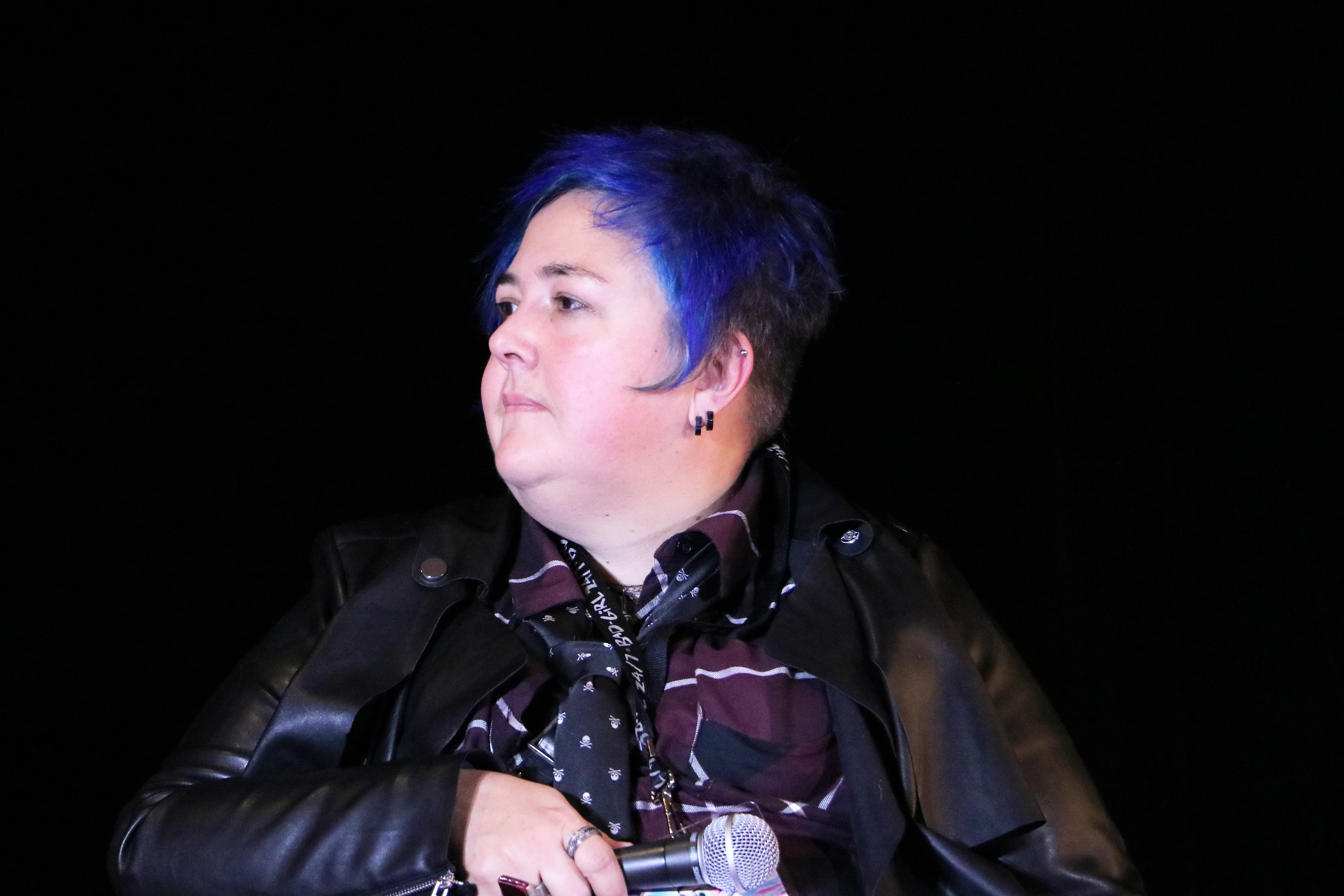 Les Utopiales, Nantes, 2018